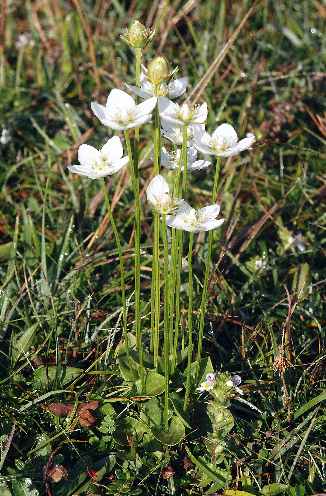 Parnassia palustris, Vilsalpsee, Austria